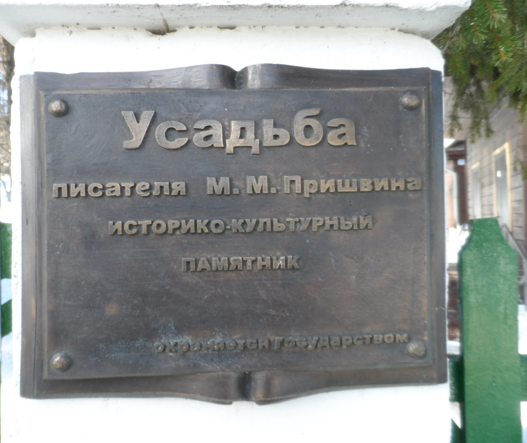 Табличка на входе в усадьбу М.М. Пришвина в Дунино